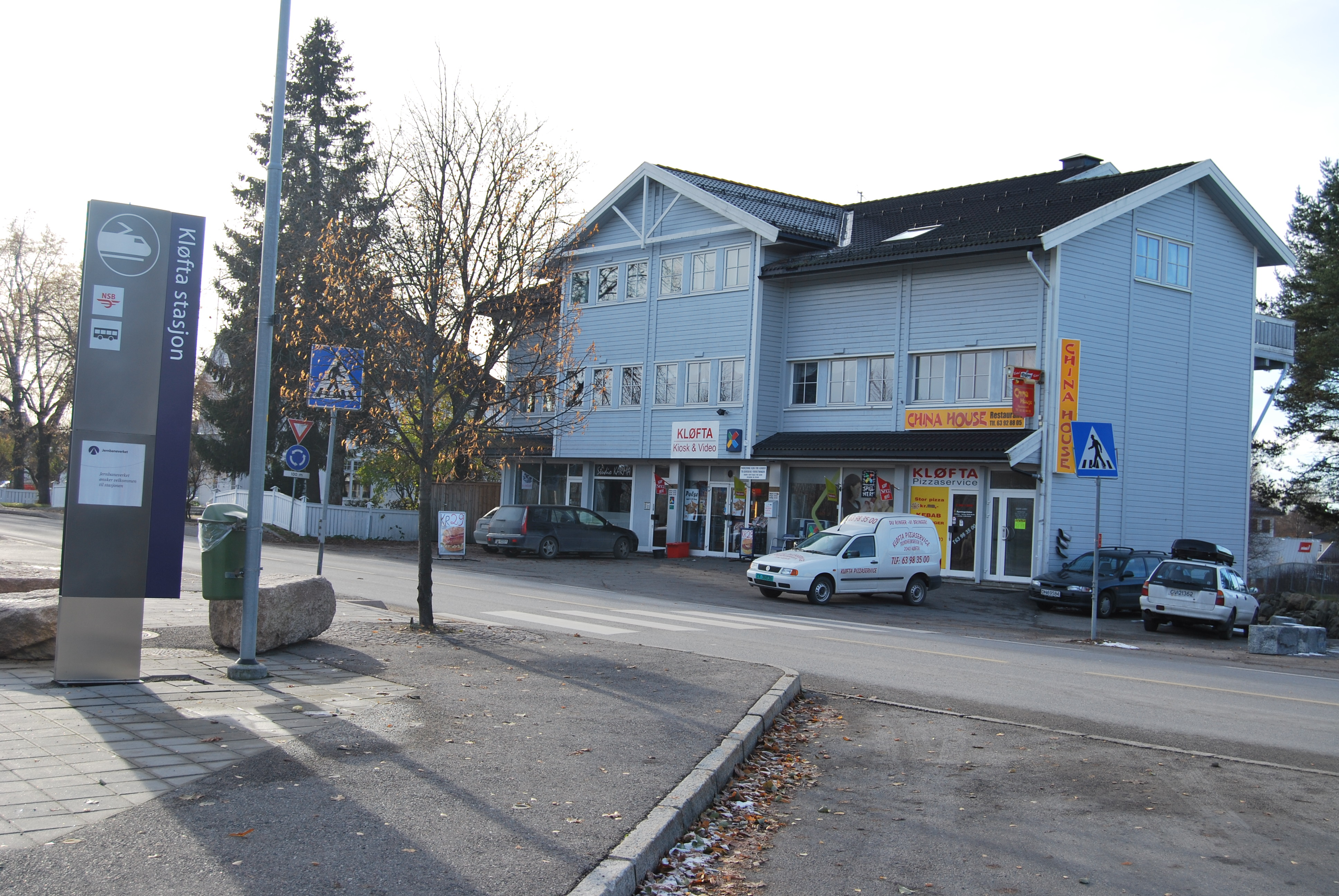 Kløfta. Okolice dworca kolejowego.